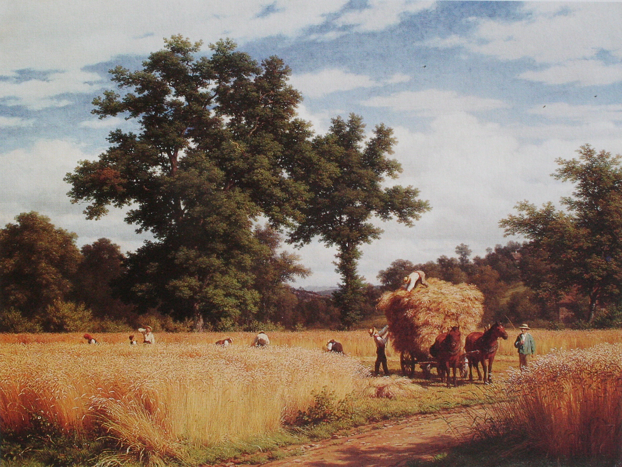 Gemälde von Robert Zünd aus dem Jahr 1875